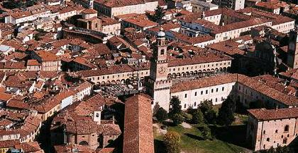 Foto del Castello di Vigevano